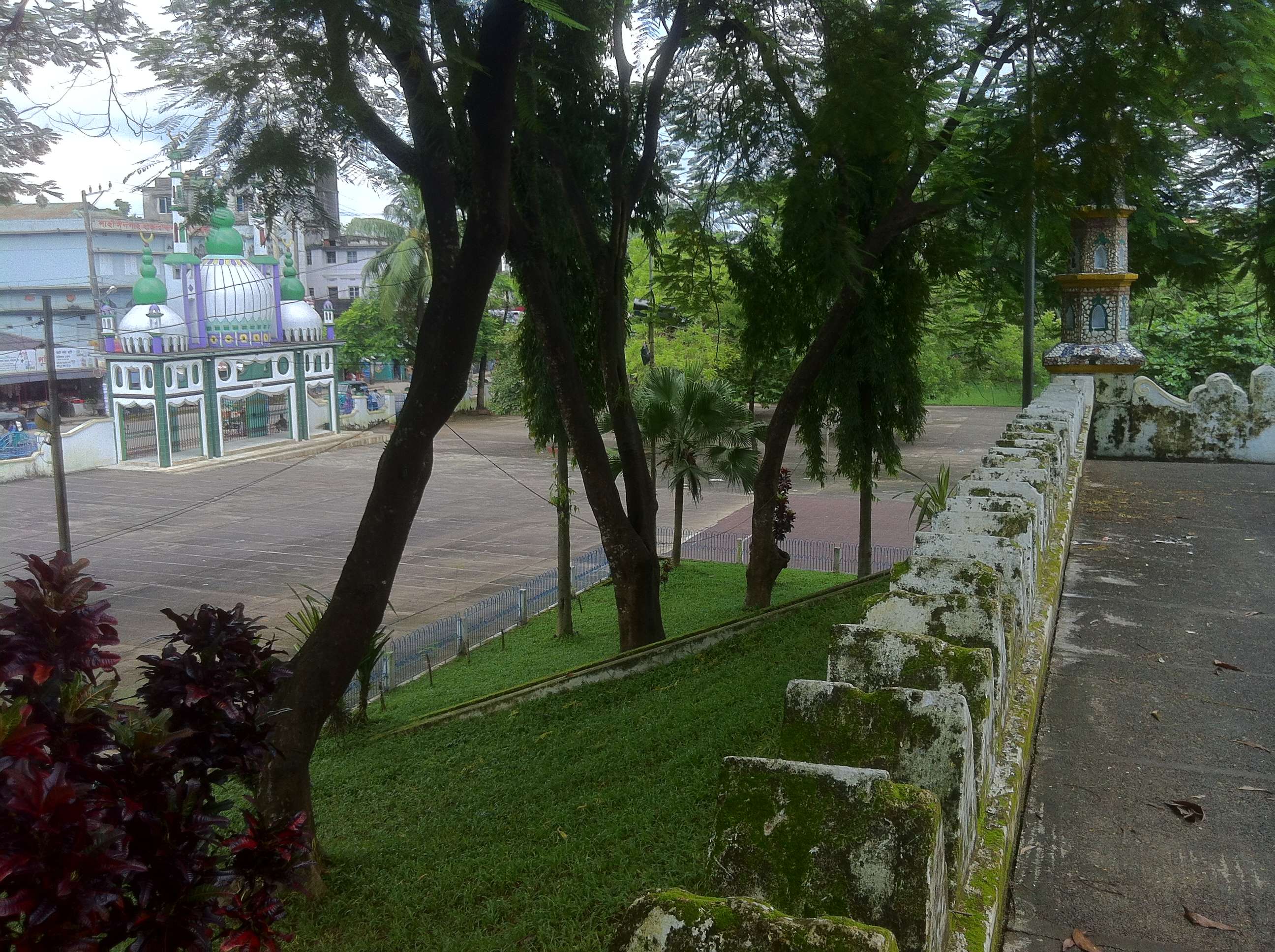 শাহী ঈদগাহ, সিলেট